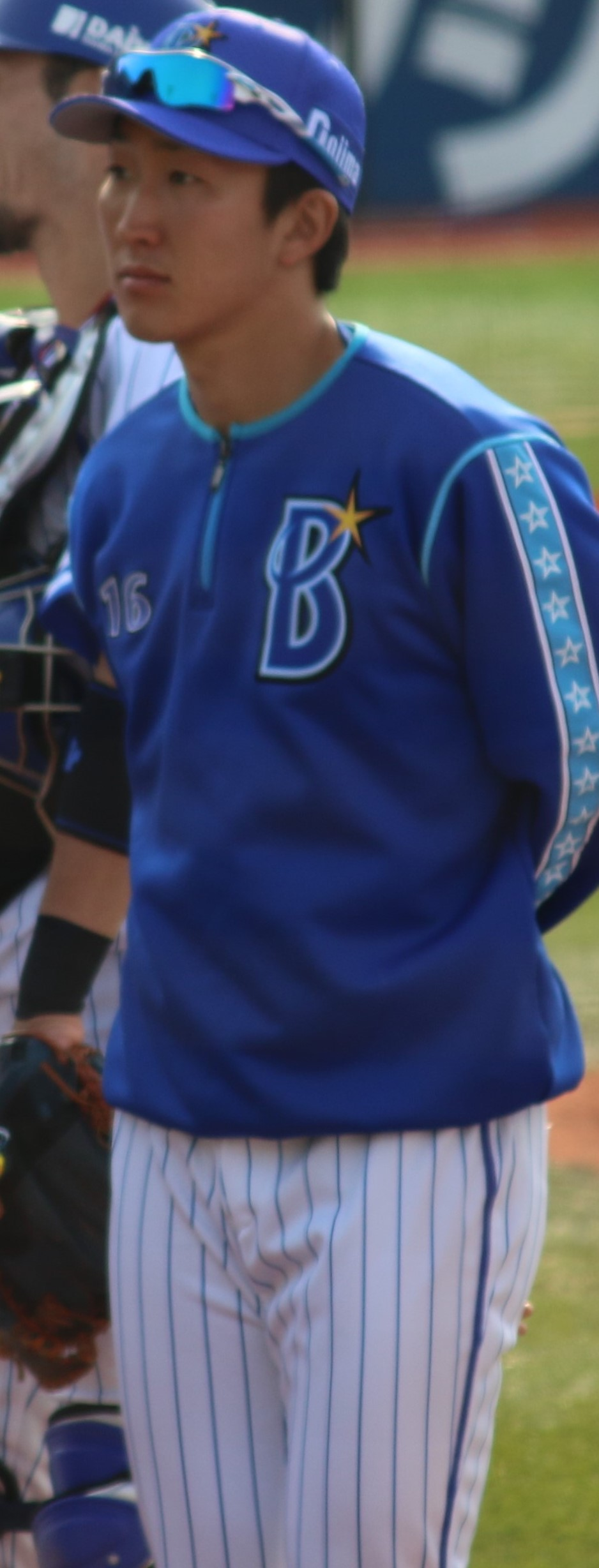 横浜DeNAベイスターズ 投手 大貫晋一 横浜スタジアム